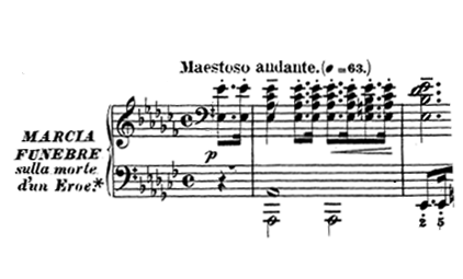 Compassos iniciais do terceiro movimento da Sonata Op. 26 de Beethoven